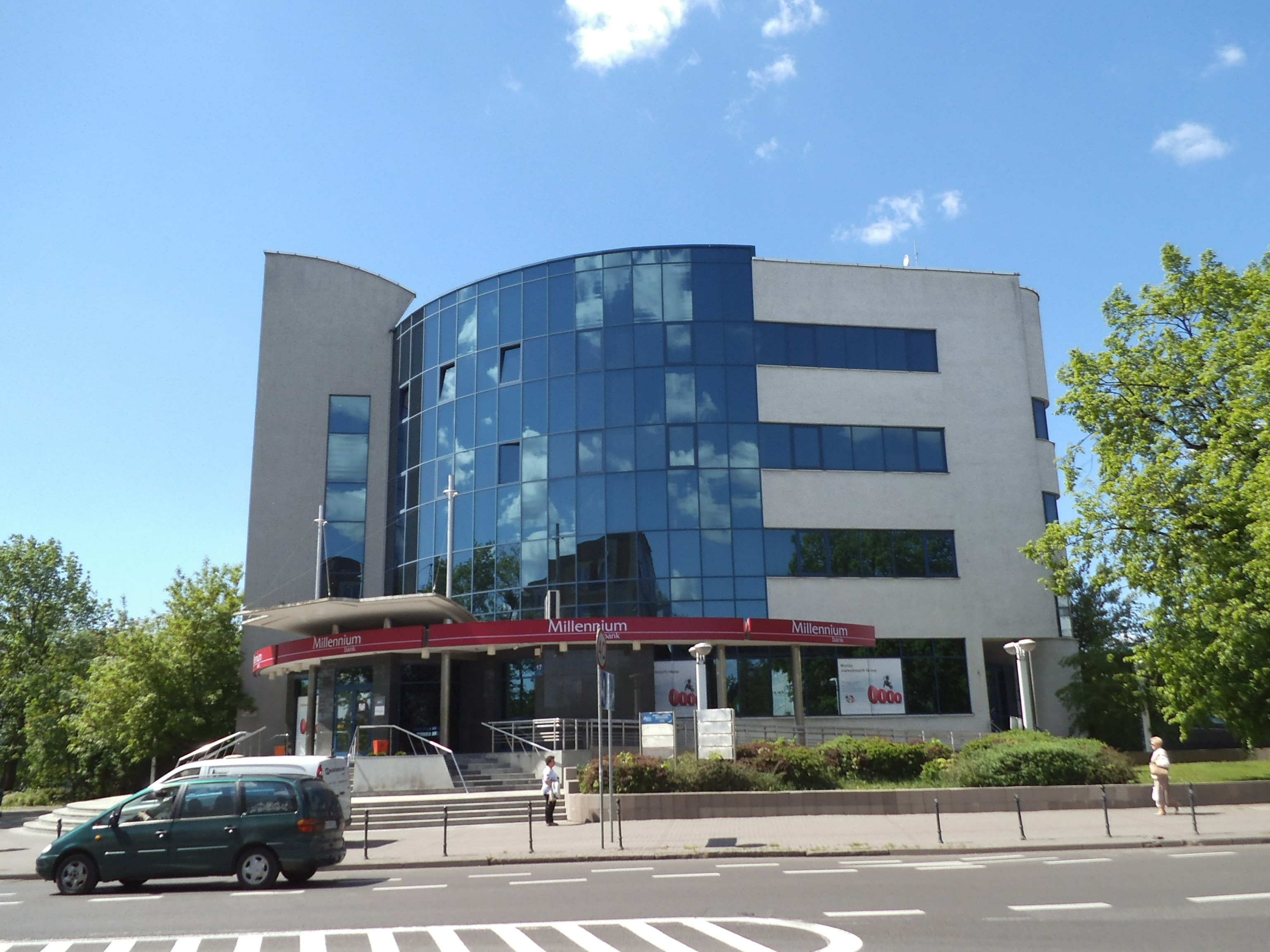 Bank na terenie torunia